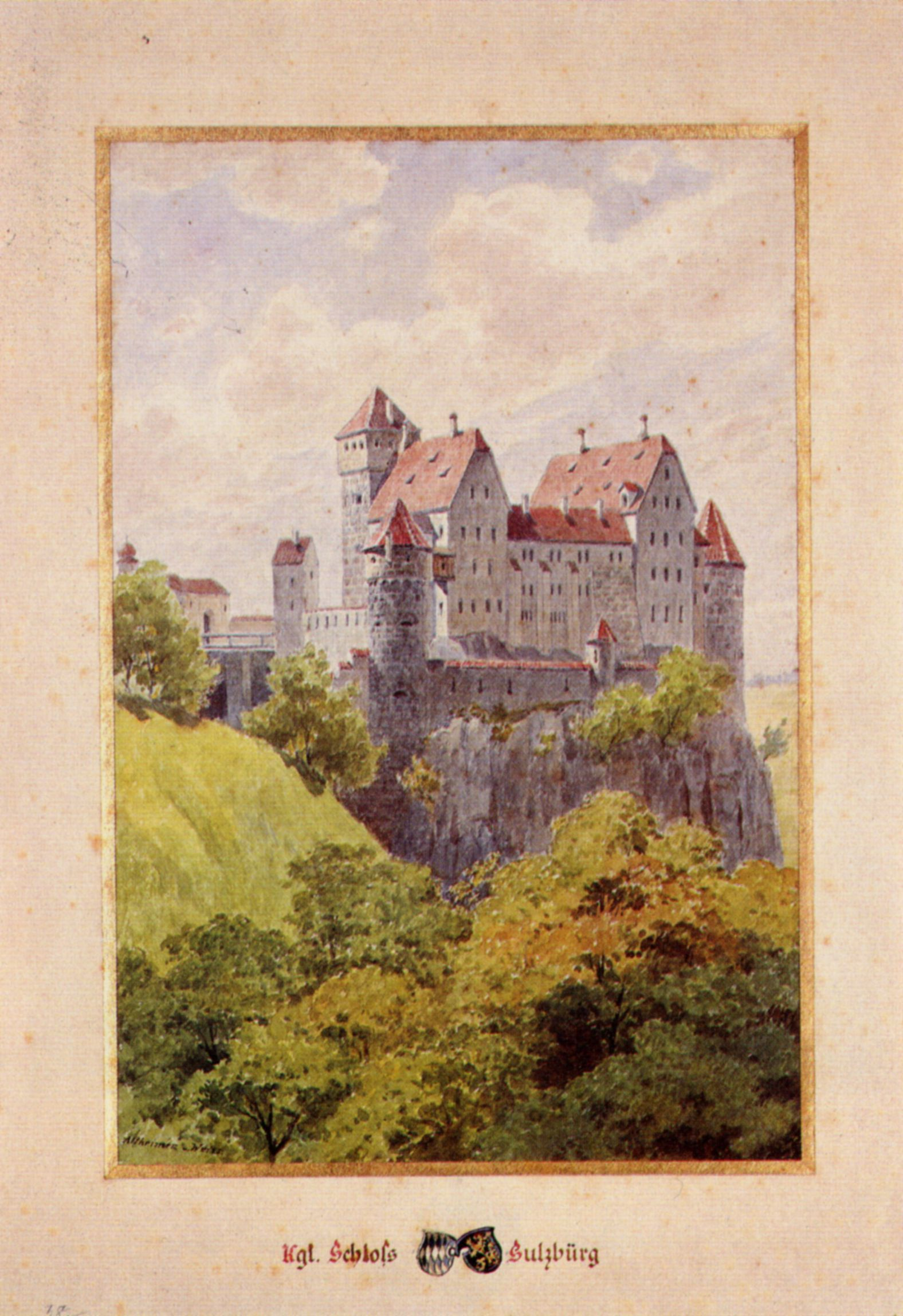 Gemälde - kgl. Schloss Sulzbürg - Oberpfalz / Städtisches Museum Regensburg